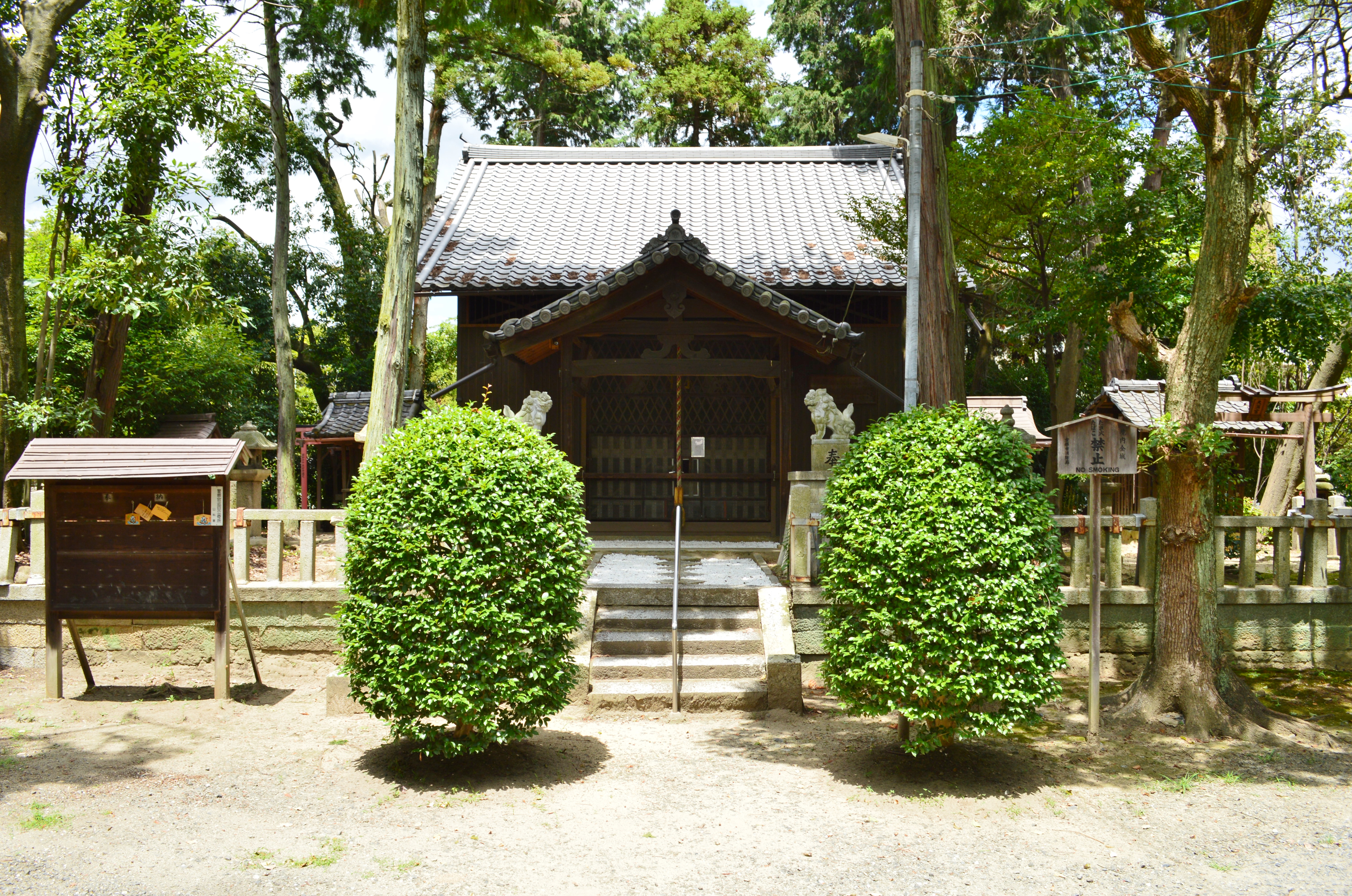 天穂日命神社 (京都市) 本殿